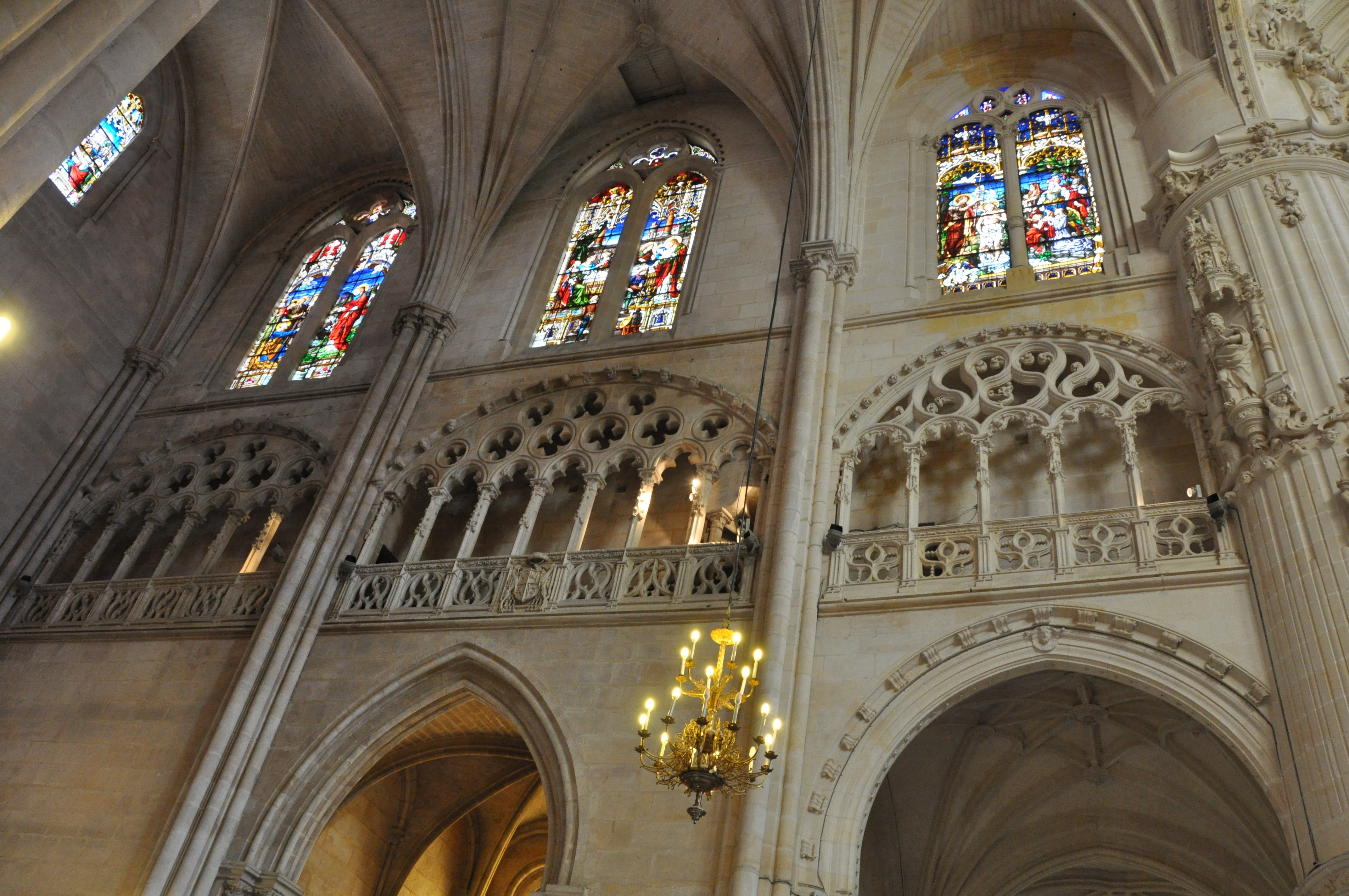 Triforio de la Catedral de Burgos atribuido a Juan de Colonia